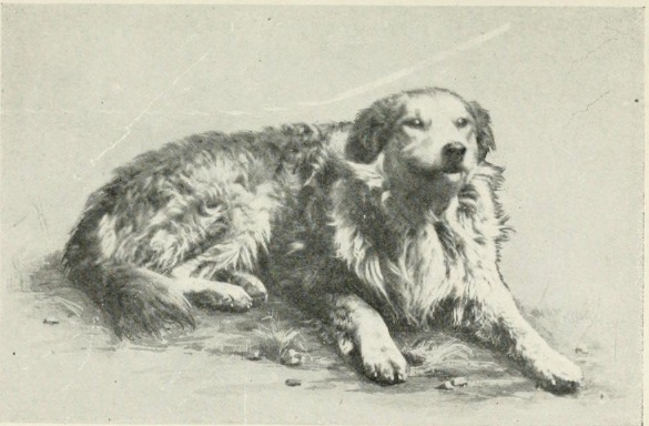 Ezra Meeker's dog Jim